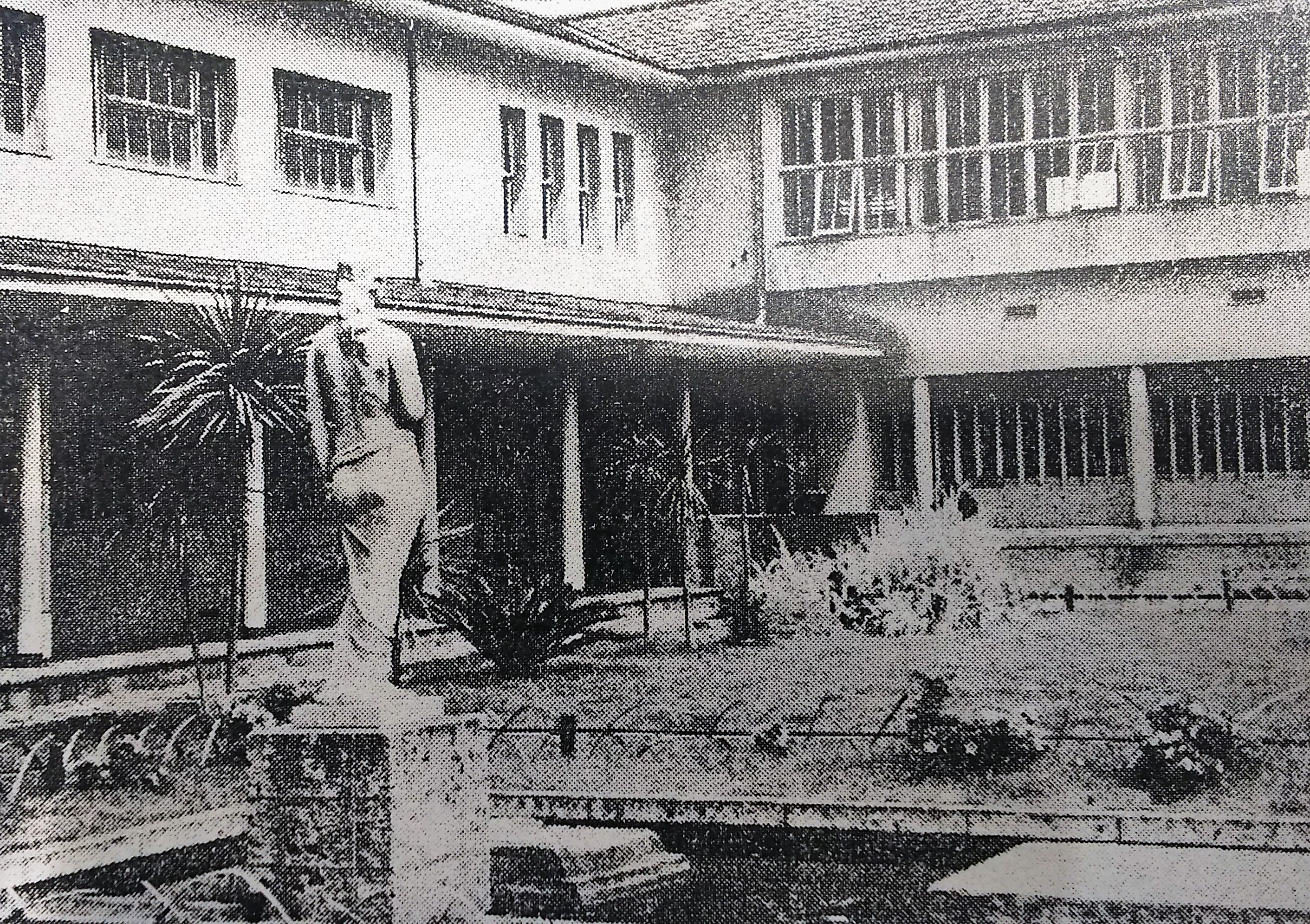 浜松市立図書館。1950年に開館した旧館。